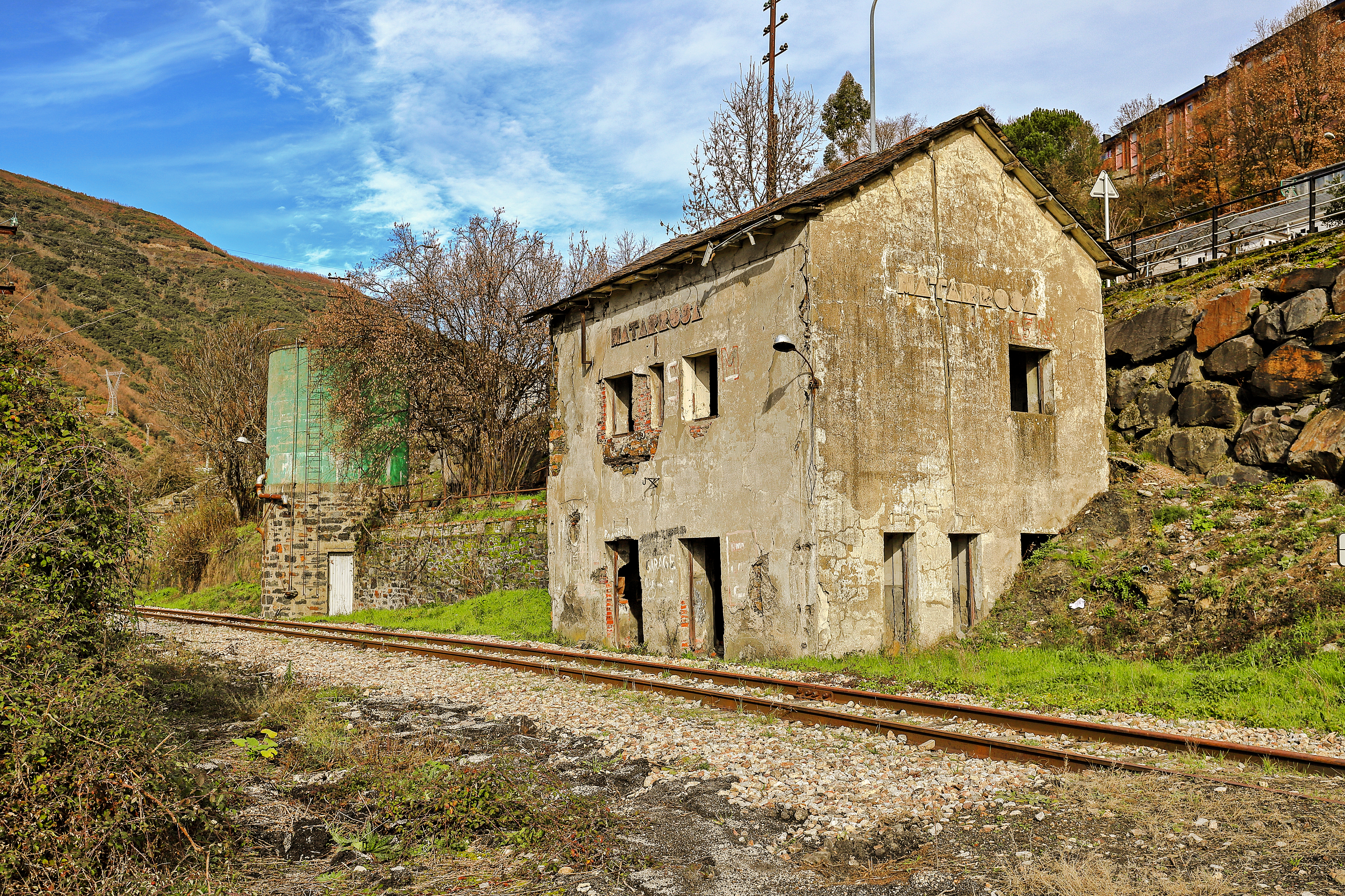 Matarrosa del Sil es una localidad que pertenece al municipio de Toreno, en la comarca de El Bierzo, provincia de León.